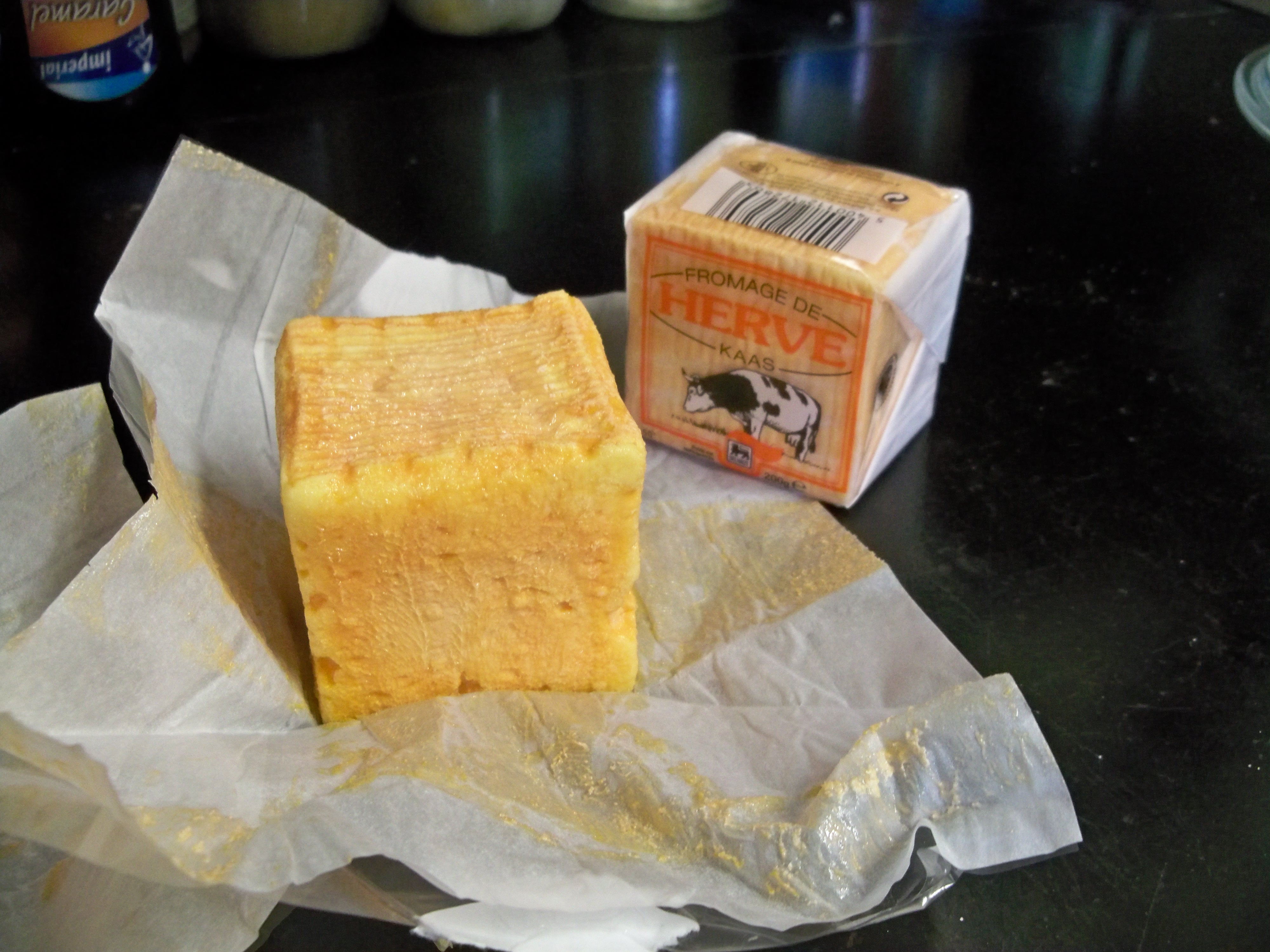 Fromage de la commune d'Herve en Belgique